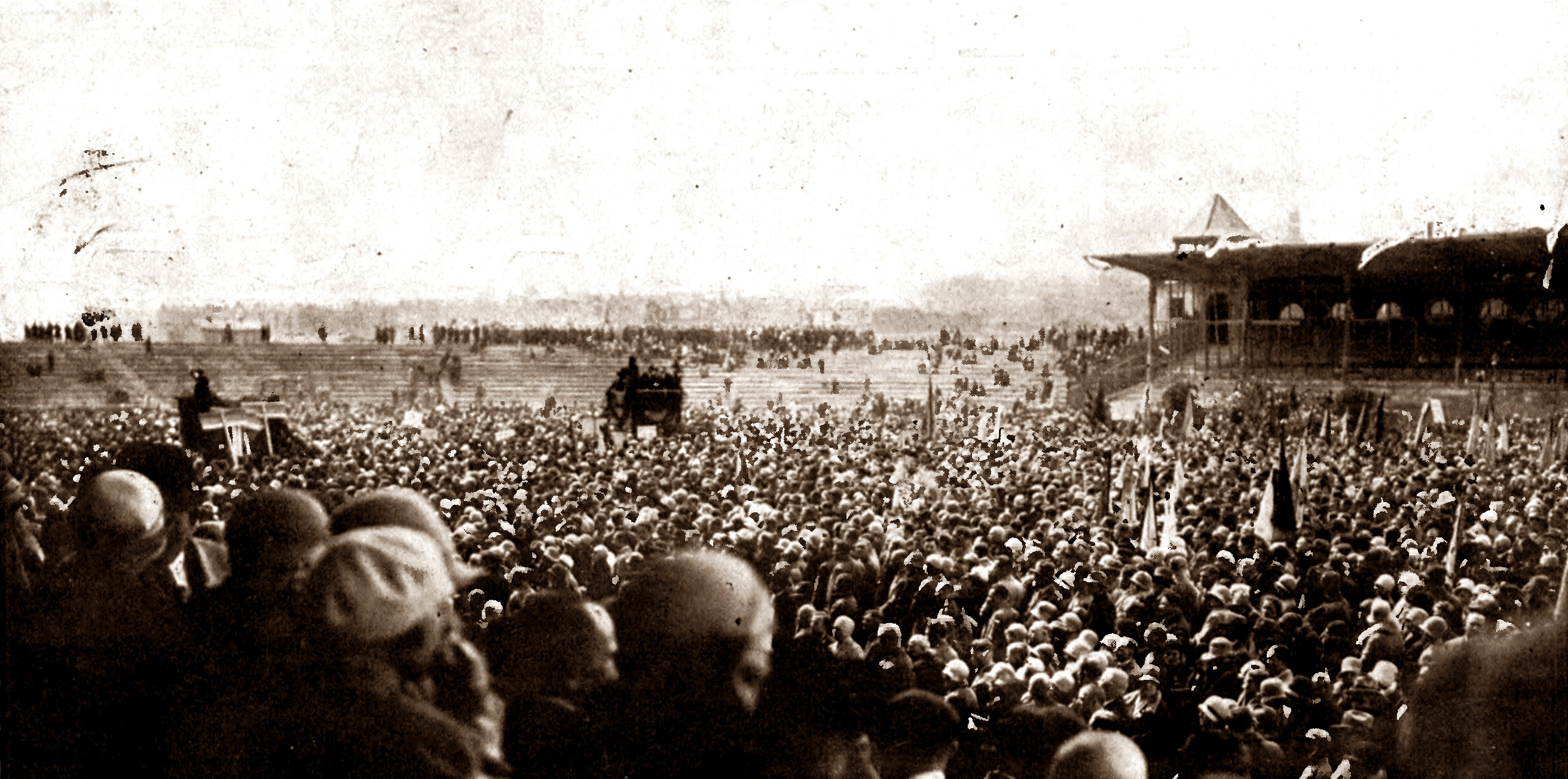 Poznań, Wszechsłowiański Zjazd Śpiewaczy: otwarcie na stadionie, chór 12.000 śpiewaków